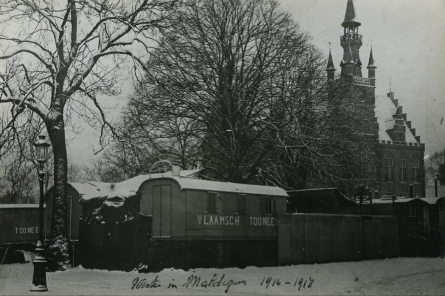 Anonieme foto van de barak en woonwagens van Willem Van den Berghes rondreizend theater tijdens Wereldoorlog I